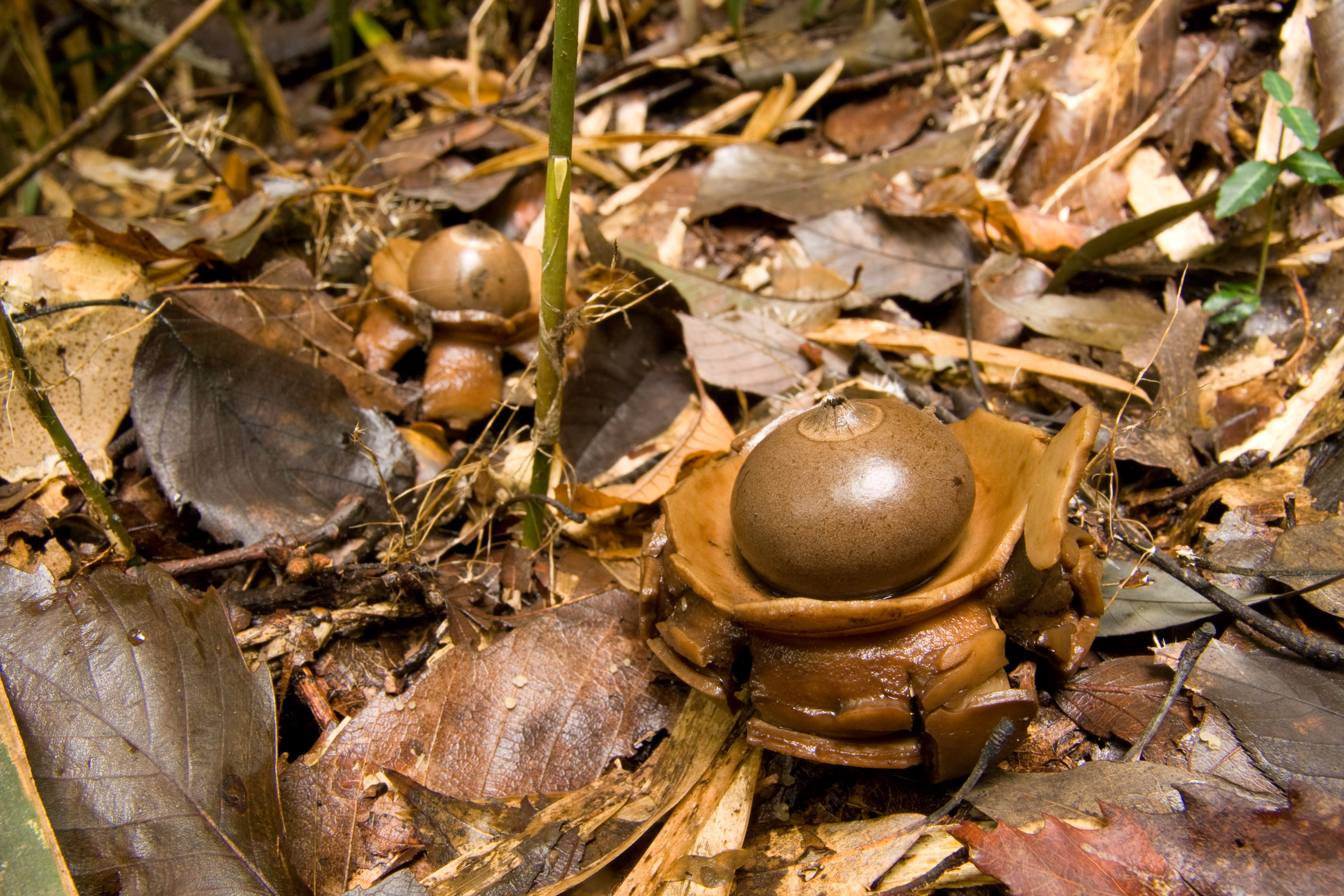 エリマキツチグリ (学名：Geastrum triplex)